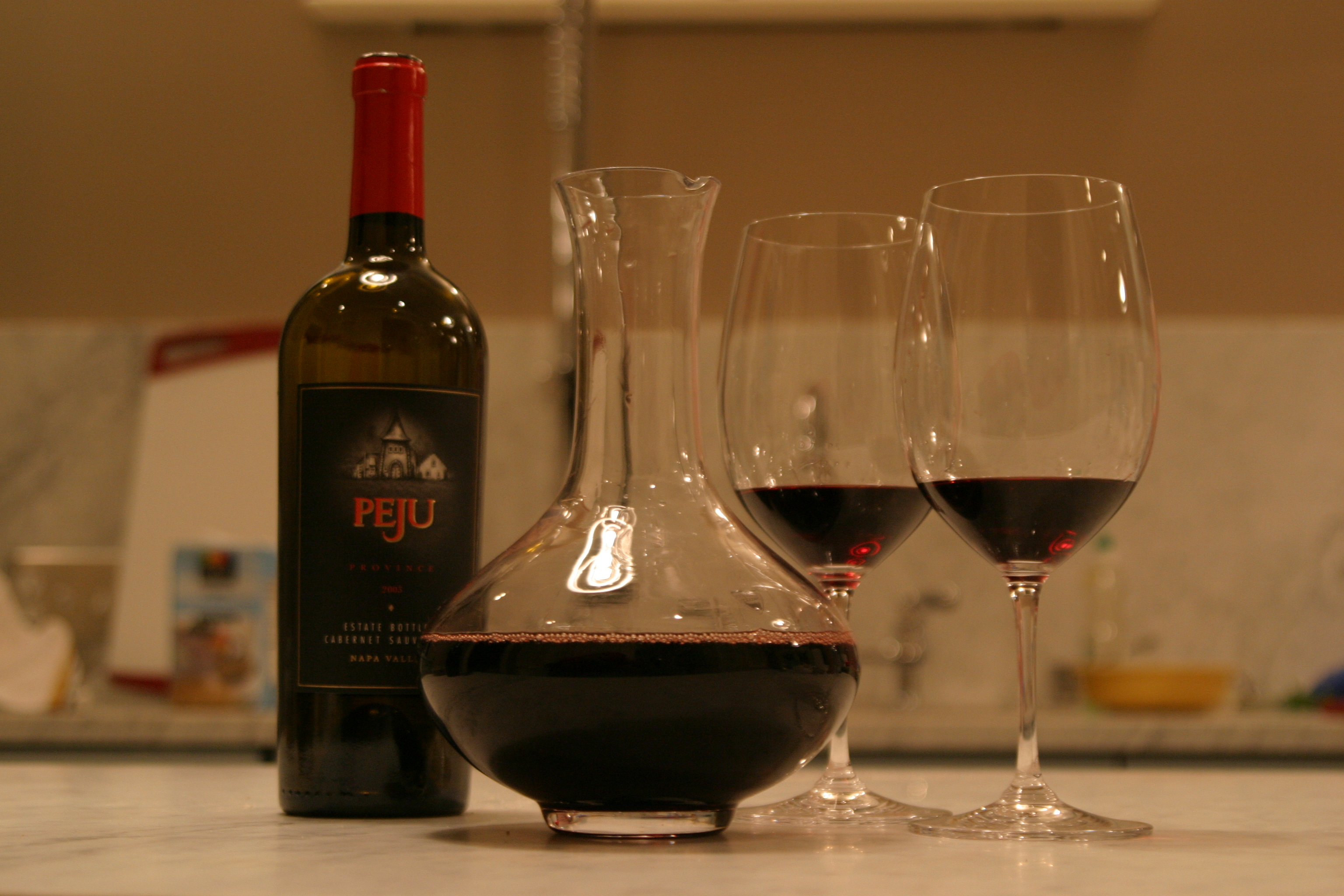 Wine decanter and glasses.